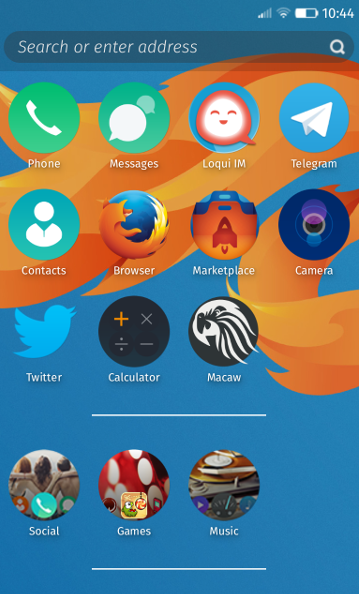 Домашний экран FirefoxOS 2.2